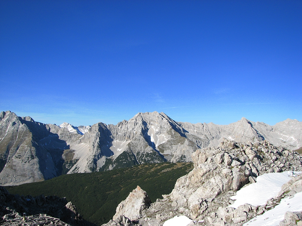 Die Praxmarerkarspitzen im Karwendel